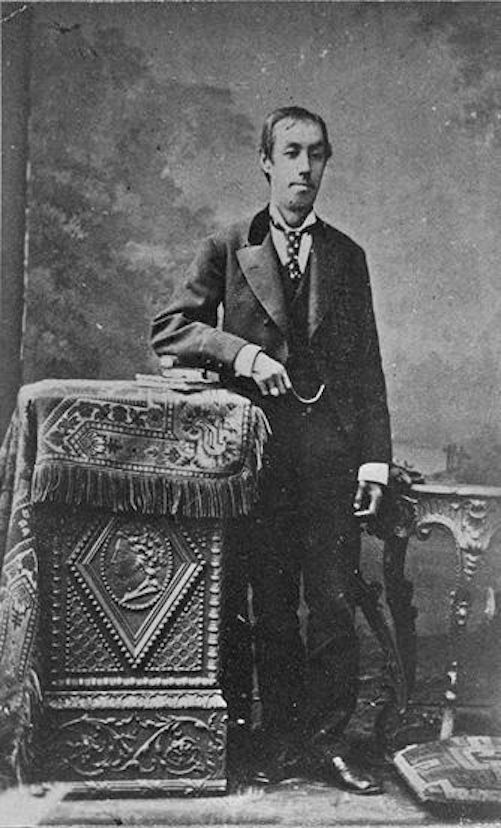 成島柳北 / Japanese journalist and essayist Ryūhoku Narushima (1837–1984)